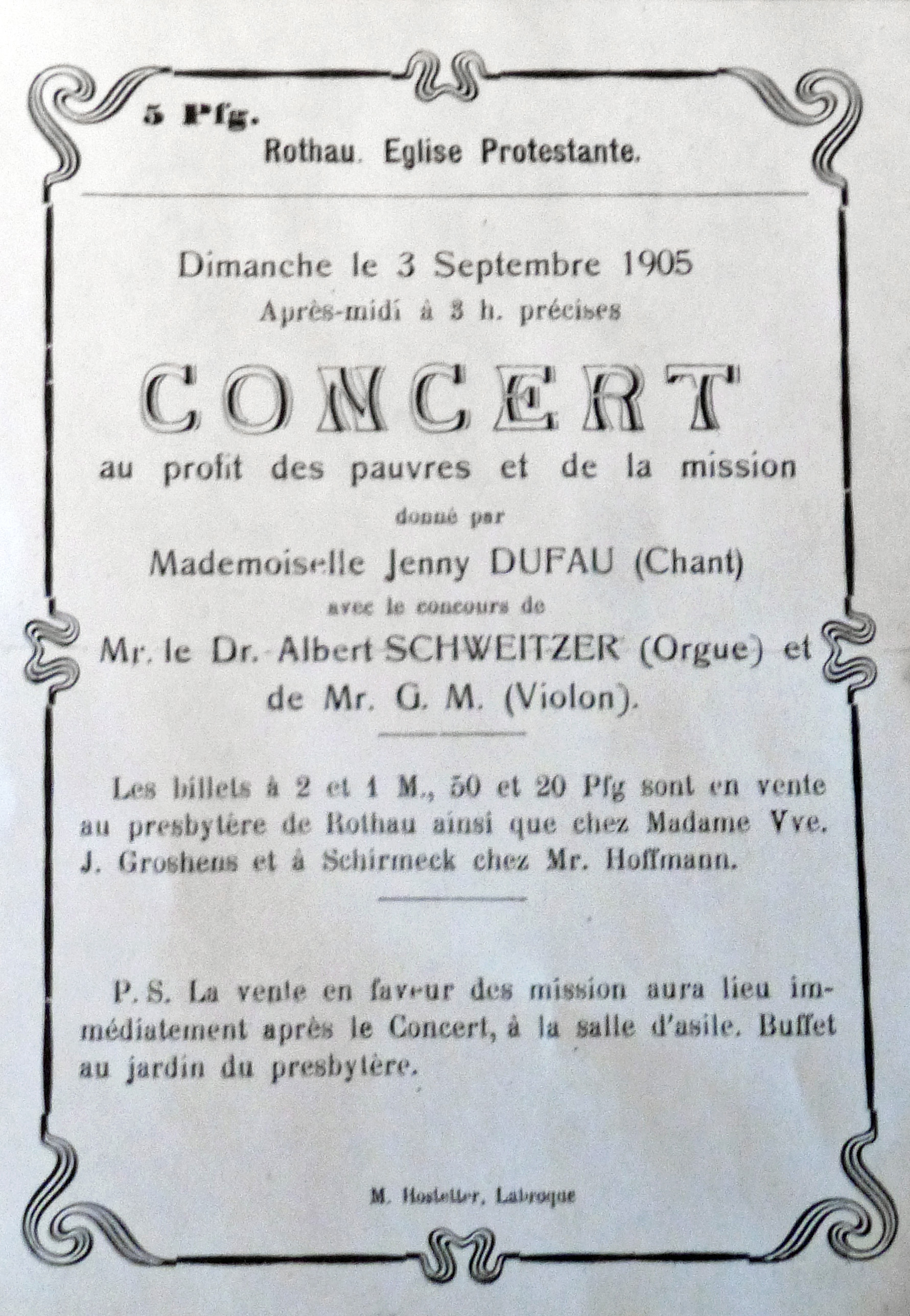 Affiche pour un concert à Rothau (Bas-Rhin) le 3 septembre 1905, avec Albert Schweitzer à l'orgue. Musée Albert-Schweitzer de Kaysersberg (Haut-Rhin).